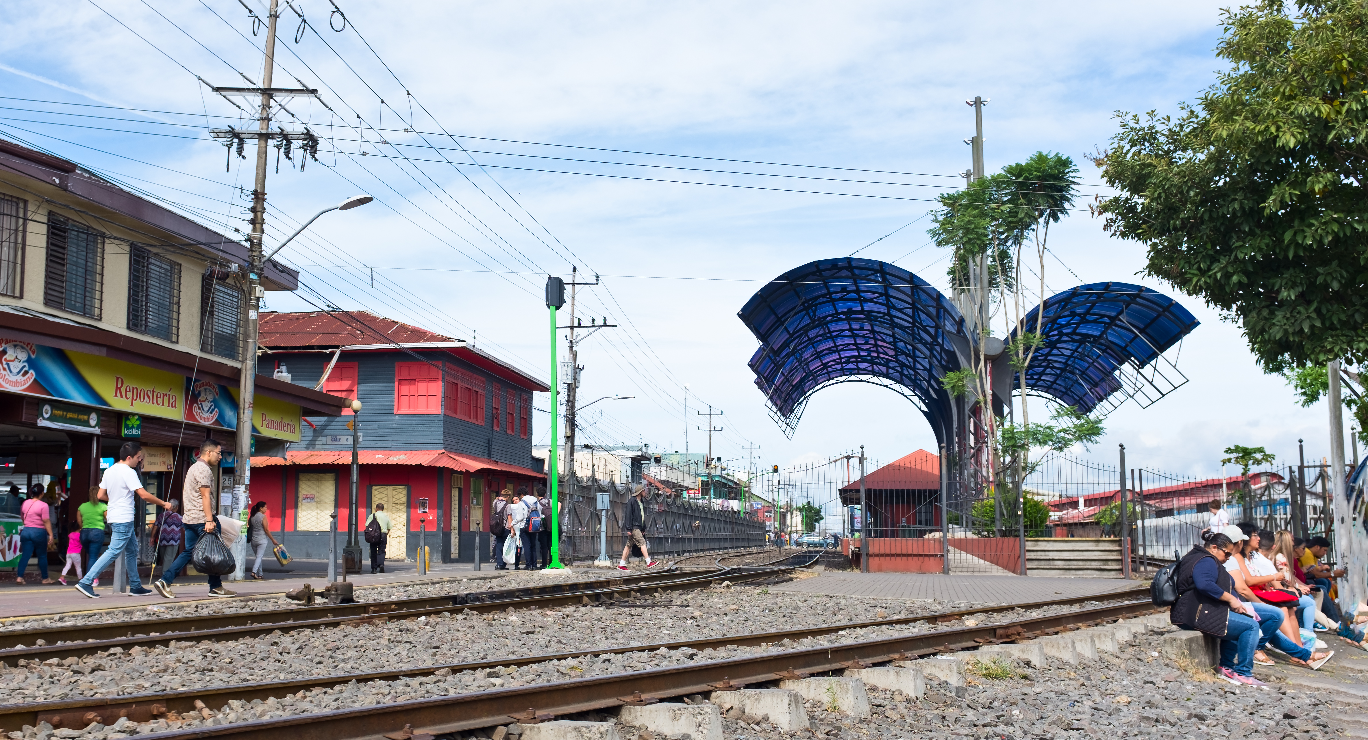 El estación de tren, INCOFER, Cartago, Costa Rica